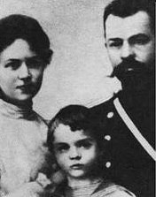 Aleksandra e Vladimir Kollontaj col figlio Michail